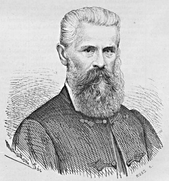 Csányi Dániel (1820–1867) debreceni református főiskolai tanár. Rusz Károly metszete Marastoni József litográfiája alapján (Vasárnapi Ujság, 1867. március 10.)